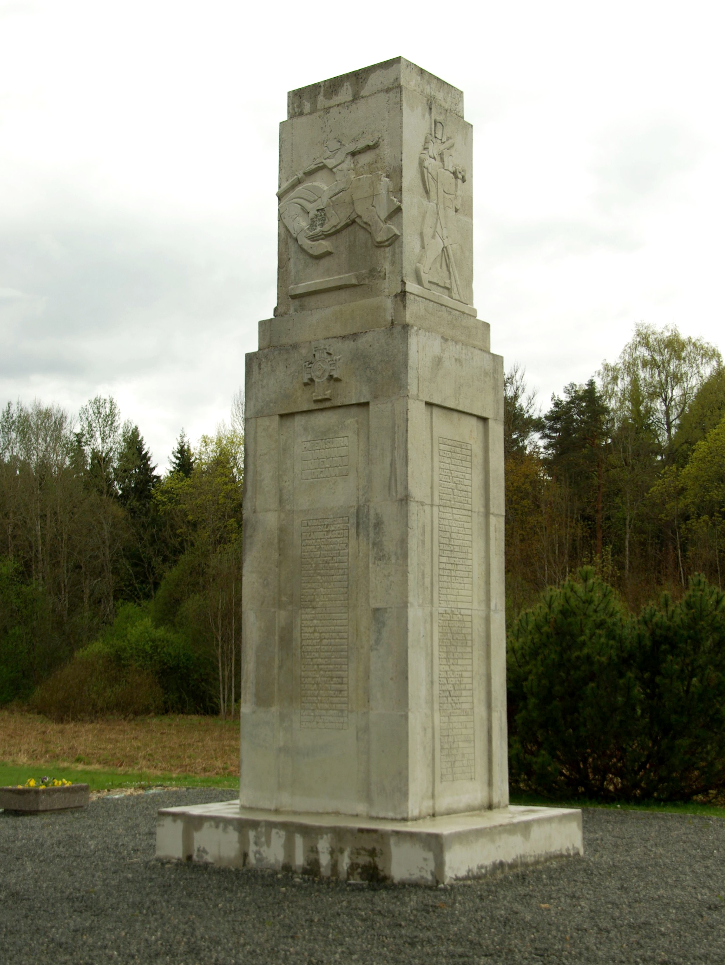 Vabadussõja mälestussammas